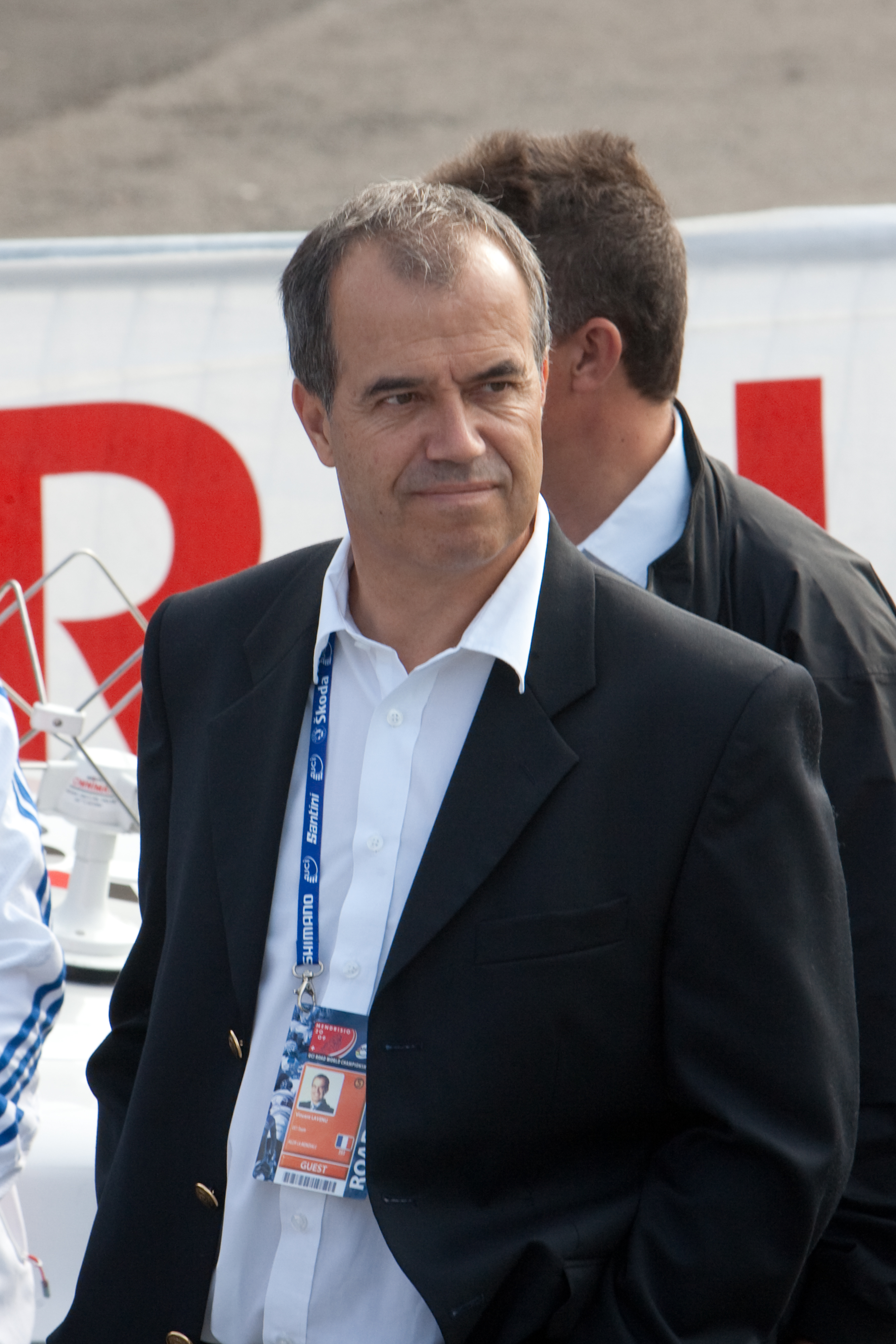 Vincent Lavenu aux championnats du monde de cyclisme en 2009 à Mendrisio.